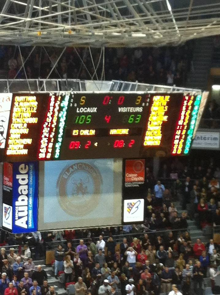 Match de Pro A entre l'Elan Chalon et Nanterre